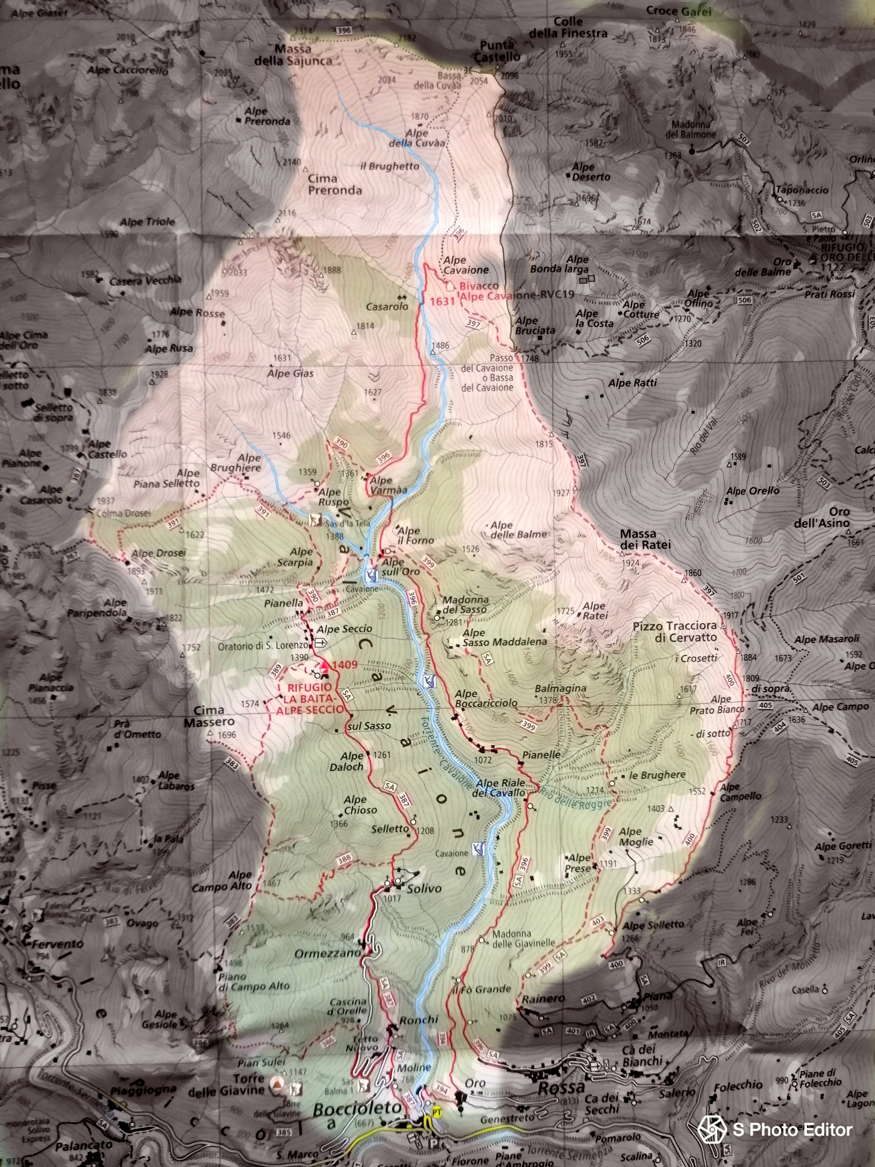 Cartina della val cavaione dettagliata con sentieri